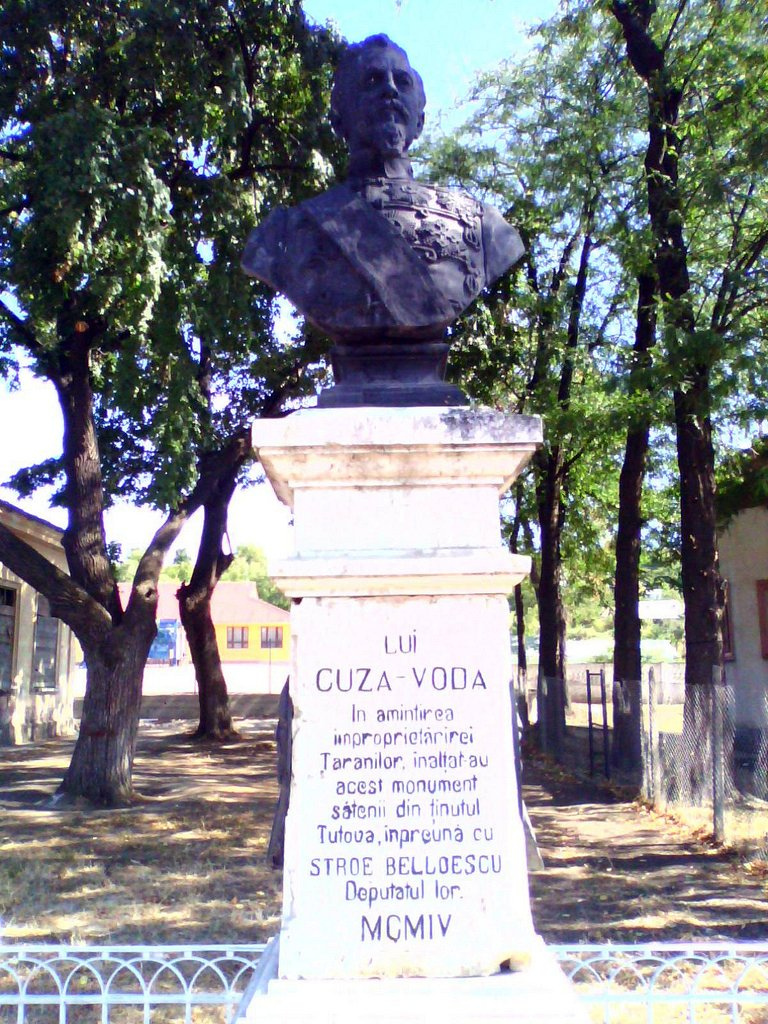 Se află în centrul Griviței din jud. Vaslui, vis-a-vis de primărie, între biserică și prima școală, făcute de Stroe Belloescu